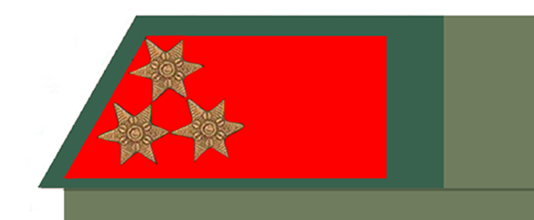 Hauptmann des k.u.k. Geniestabes mit den Distinktionsabzeichen gem Verordnung von 1916 auf der graugrünen Feldbluse